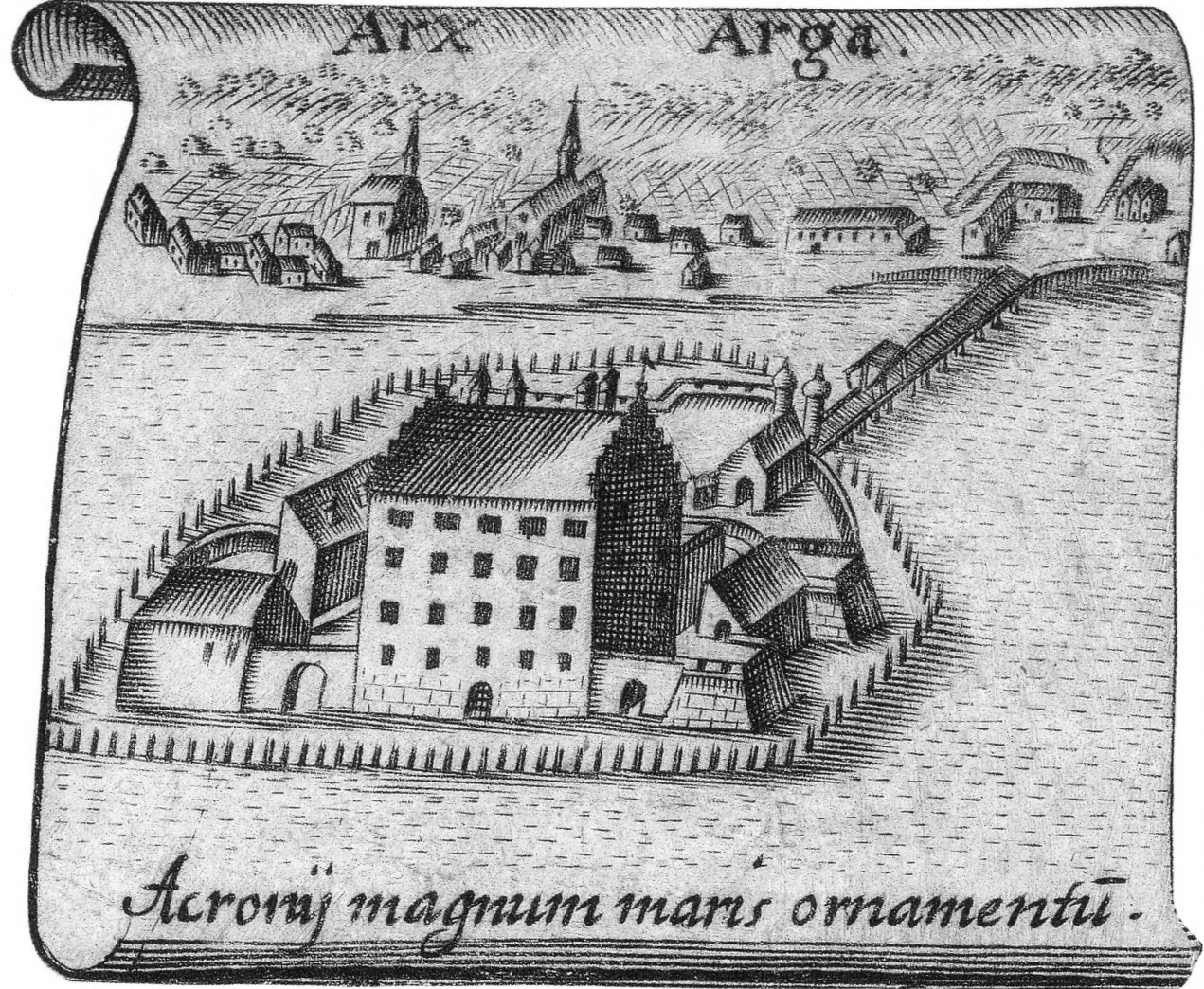 Schloss Argen Ausschnitt aus einer Bodenseekarte